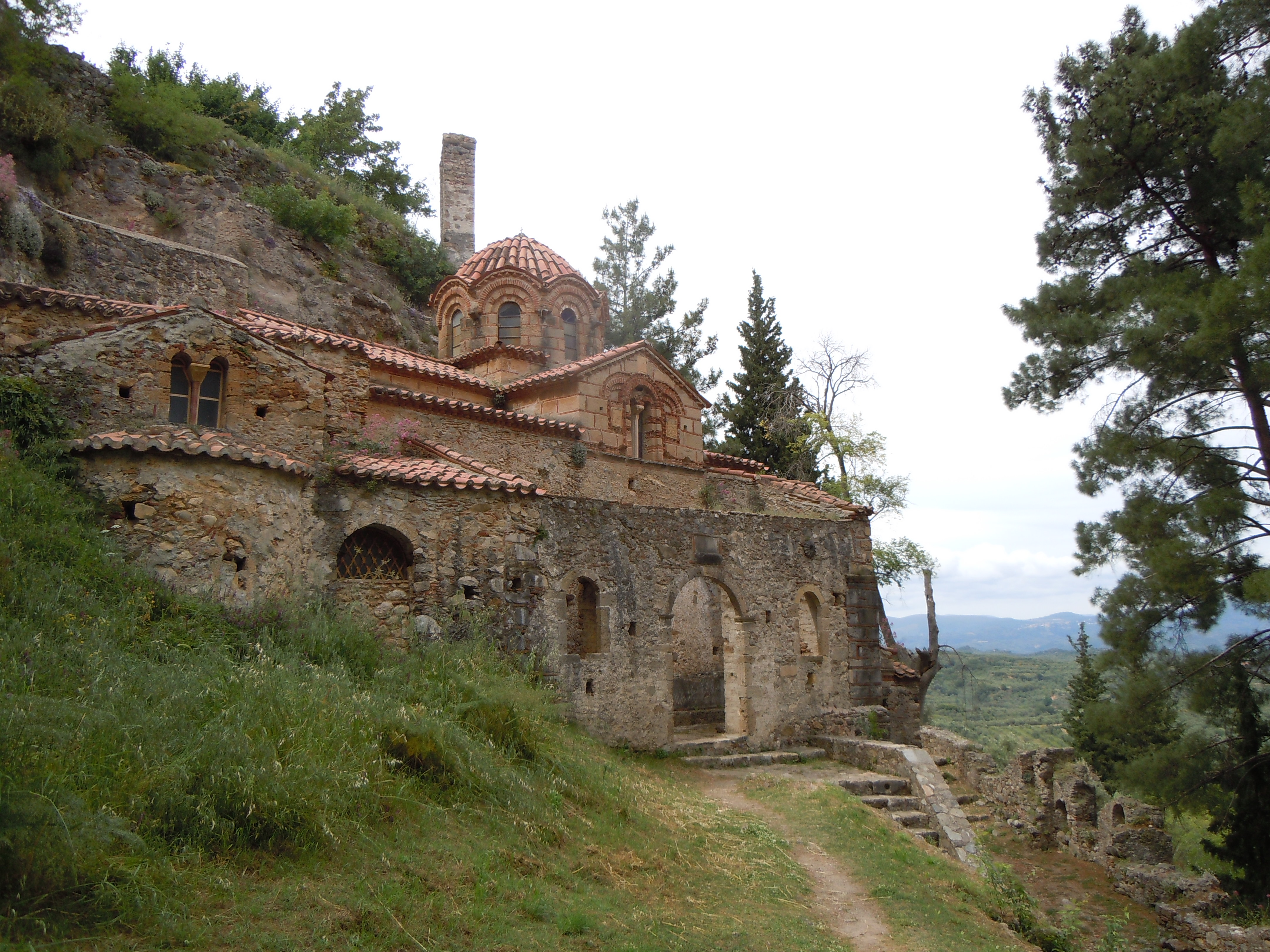 Monastère Perivleptos à Mistra - vue coté sud